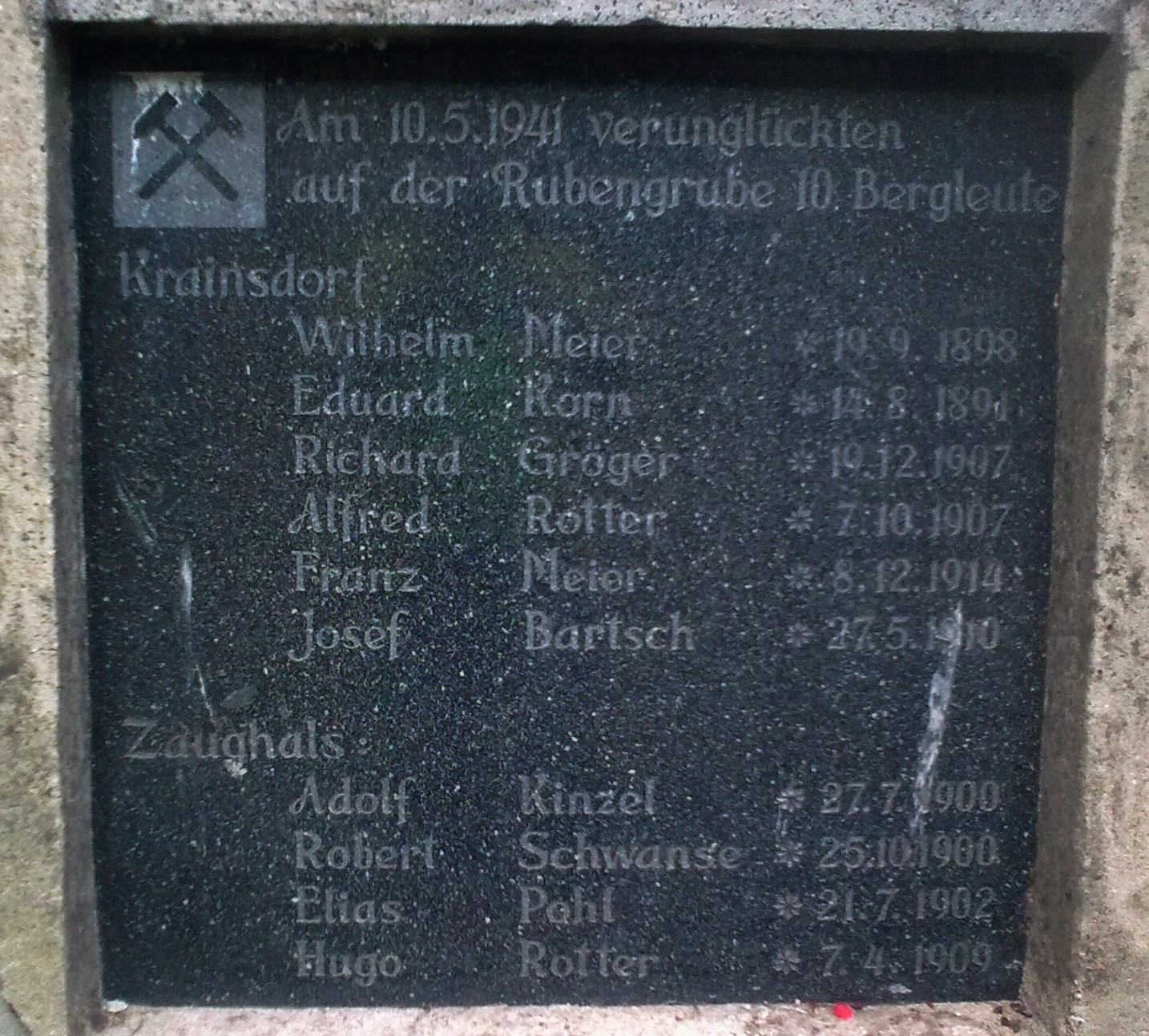 Krajanów. Pomnik ofiar katastrofy górniczej